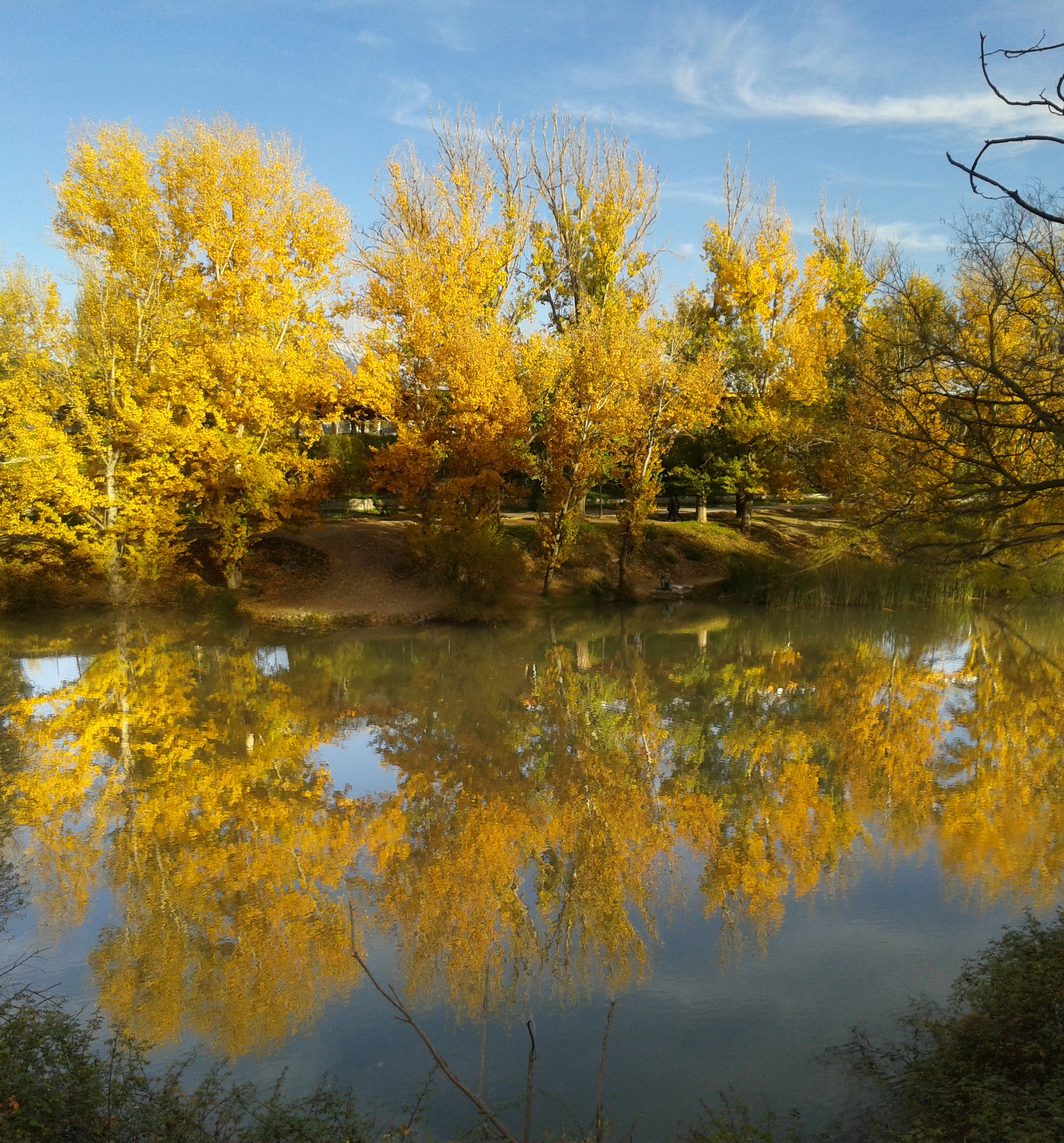 Otoño en la Cuenca del río Manzanares - Monte del Pardo. This is a photography of a Special Area of Conservation in Spain with the ID: ES3110004. Natura2000 entry, EEA entry